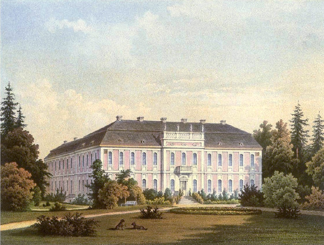 Schloss Finckenstein, Kreis Rosenberg, Regierungs-Bezirk Marienwerder, Provinz Preußen, erbaut John von Collas